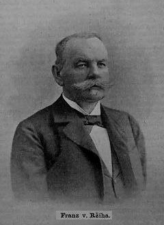 Franz von Ržiha, český vynálezce a stavitel